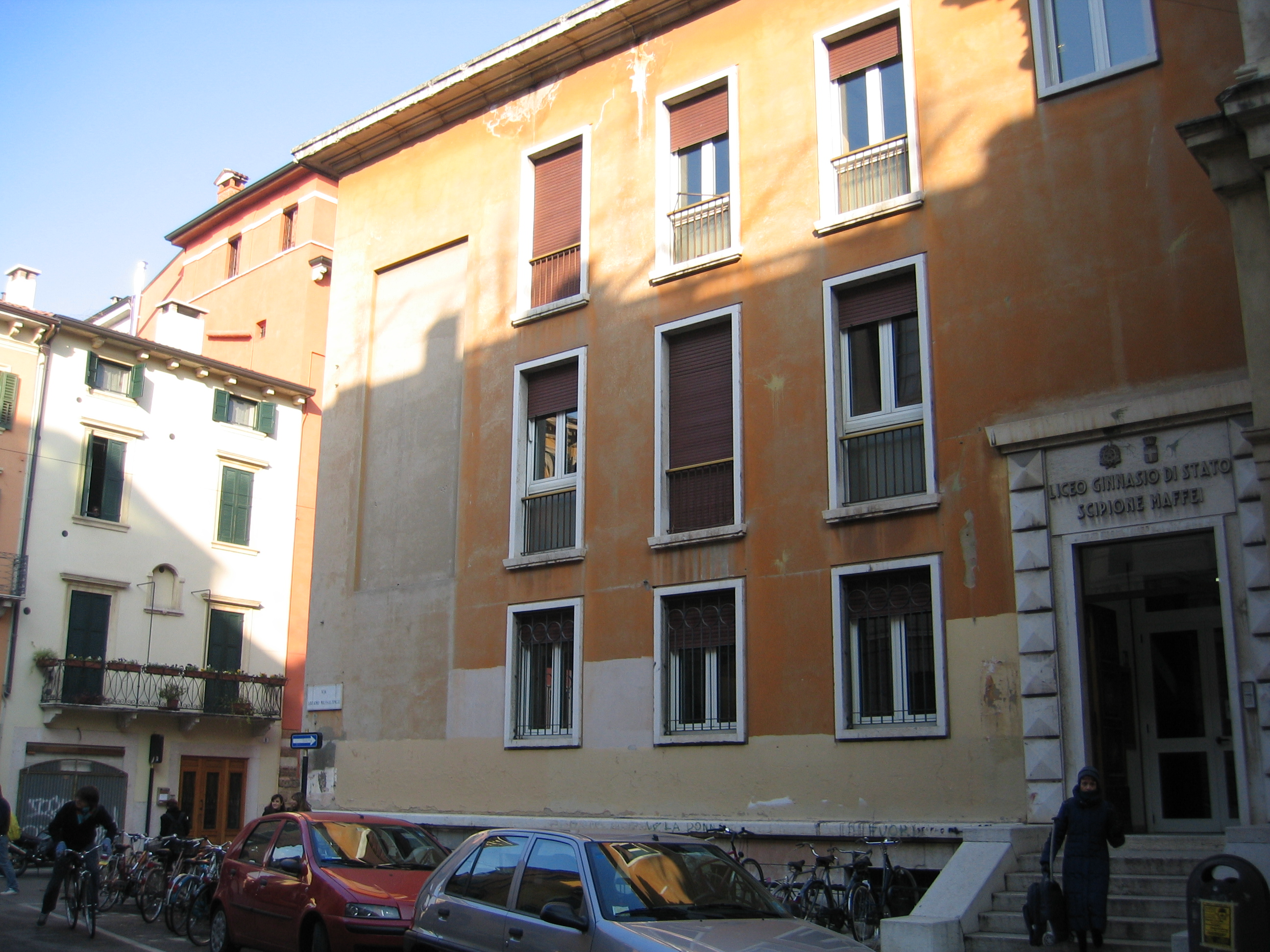 Liceo Ginnasio di Stato "Scipione Maffei" di Verona